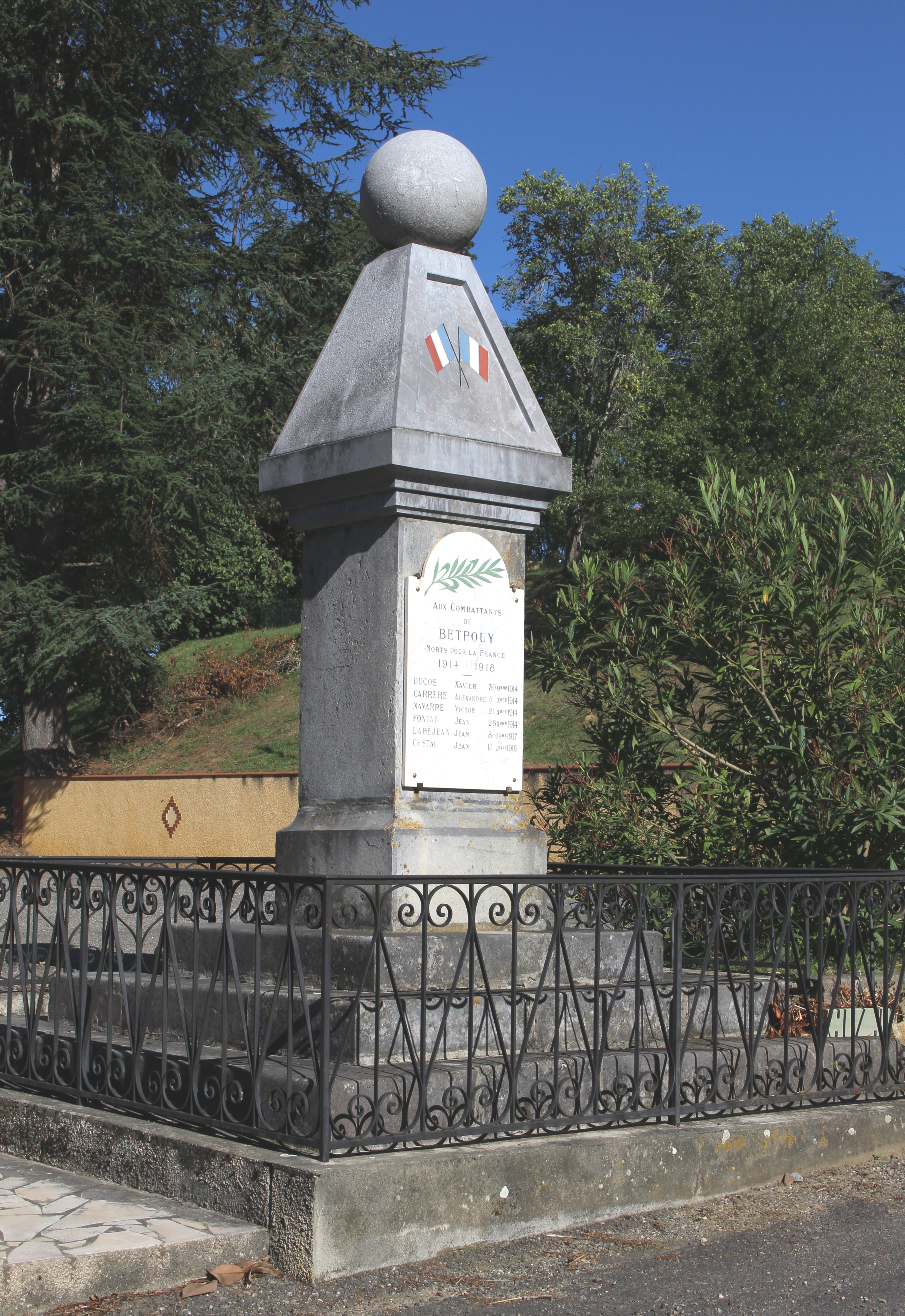 Monument aux morts de Betpouy (Hautes-Pyrénées)